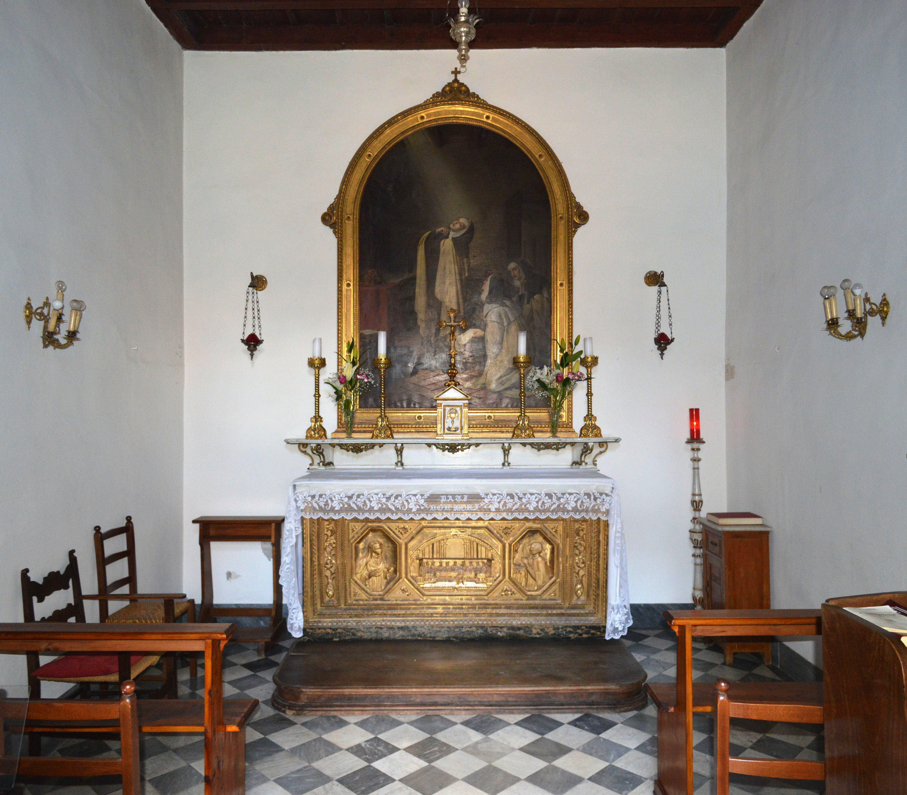 La cappella ricavata nella cella di santa Maria Maddalena de' Pazzi.